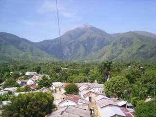 Vista panoramica de la población de Atánquez.